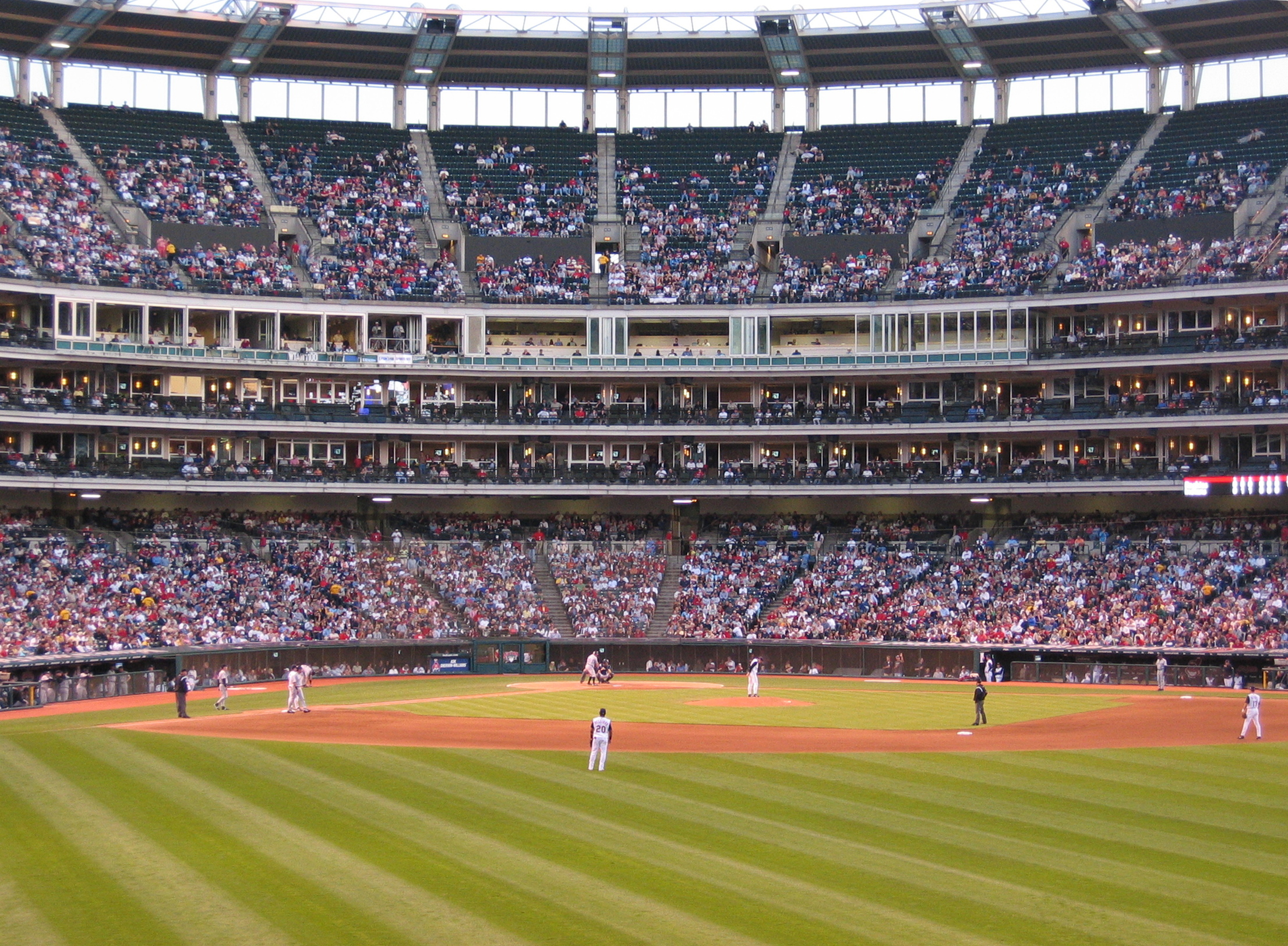 Autore: zoonabarDescrizione: veduta del Jacobs Field di Cleveland